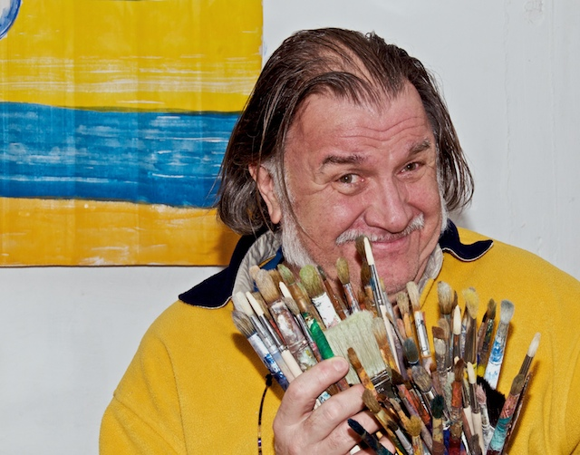 De Moritz Ney a sengem Atelier. Kategorie:Lëtzebuergesch Moler